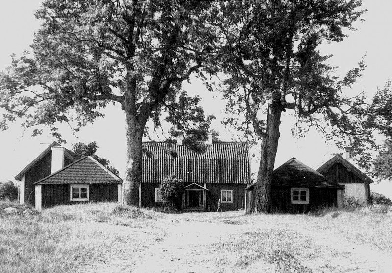 Rånö herrgård